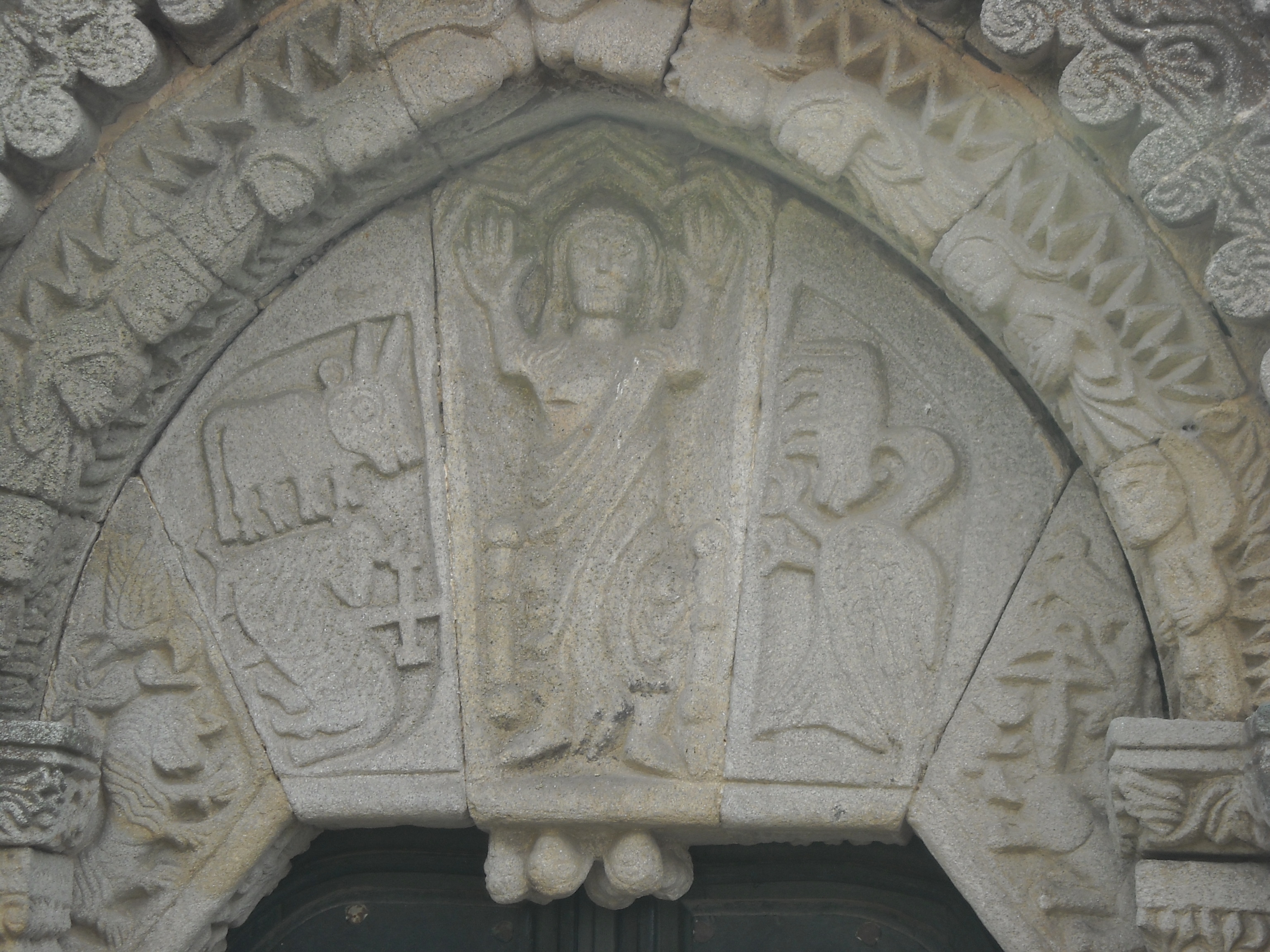 Monterrei, parroquia de Santa María de Monterrei, concello de Monterrei, provincia de Ourense. Igrexa parroquial, entrada lateral. Tímpano con tetramorfos.